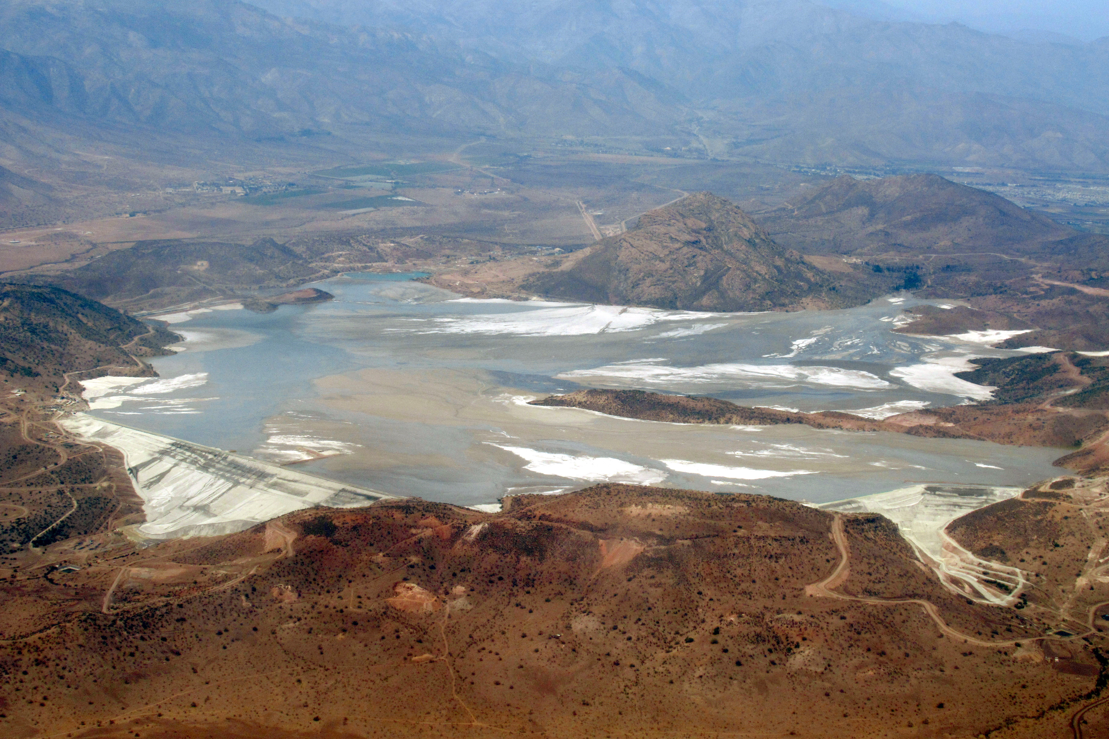 Embalse de relaves Las Tórtolas (670 m s.n.m.) de la planta de flotación de la minera de cobre Los Bronces, en la comuna de Colina. Altitud de vuelo 1910 m s.n.m. aproximadamente.